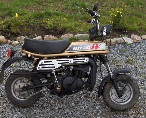 Suzuki PV50